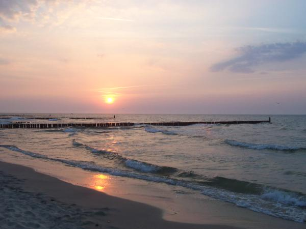 Zachód słońca w Ustroniu Morskim